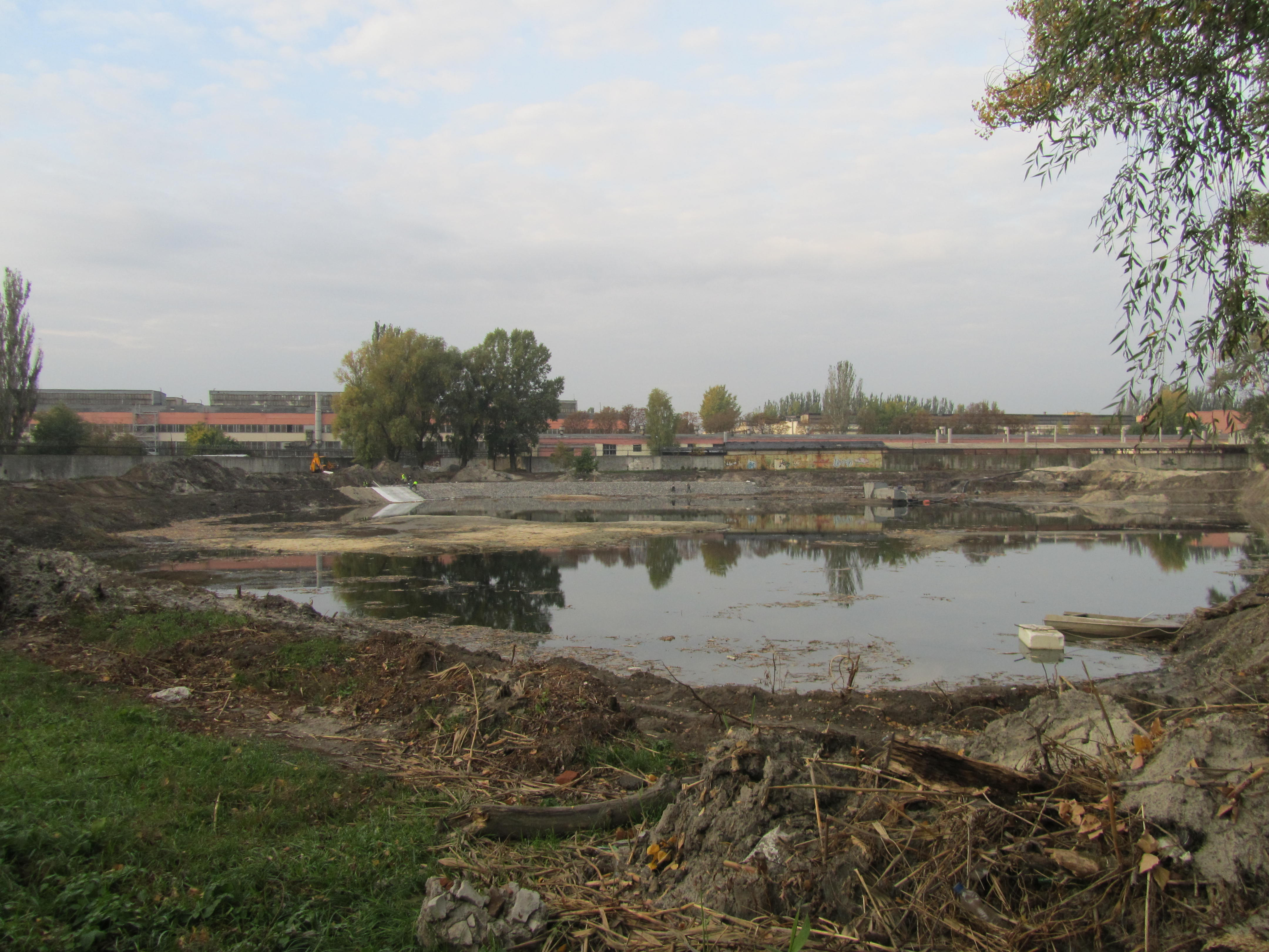 Міський сад, Кременчуцький р-н, м. Кременчук, біля електростанції